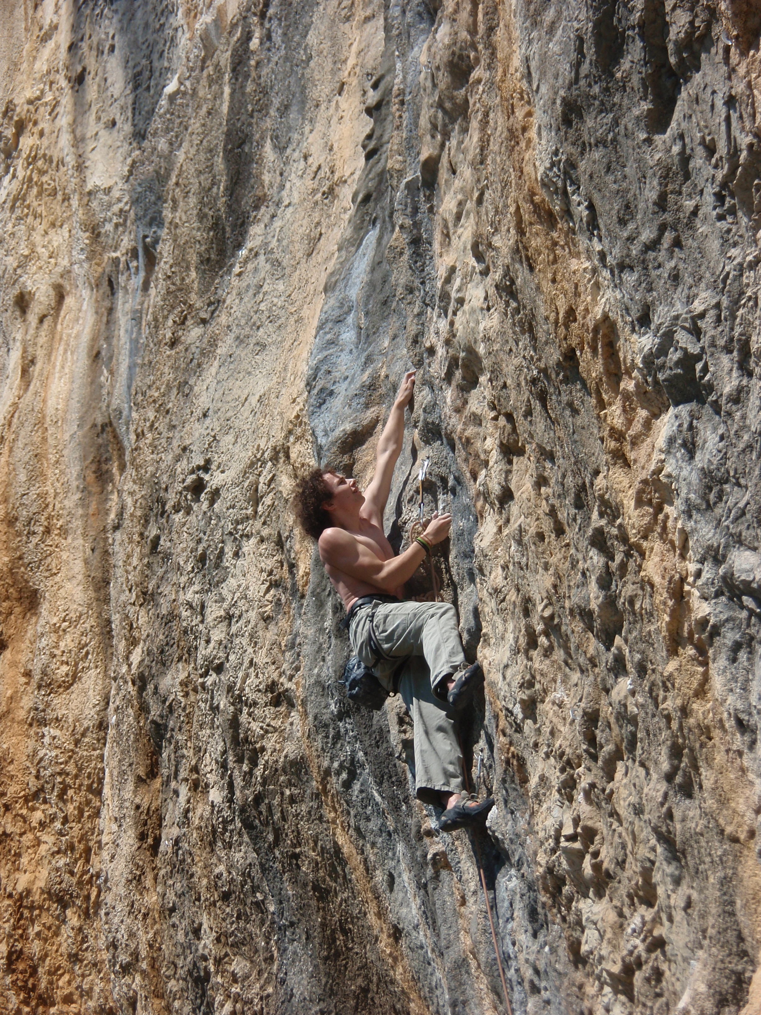 Członek SAKWY AGH na drodze Truffelschwein 7a, Kompanj Chorwacja